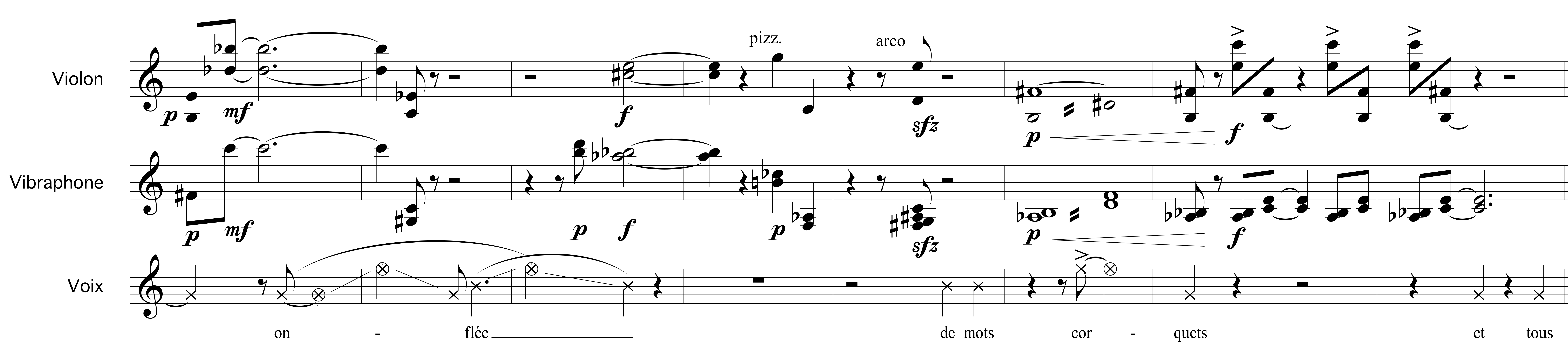 Extrait de la pièce VI d'Anna Livia Plurabelle d'André Hodeir